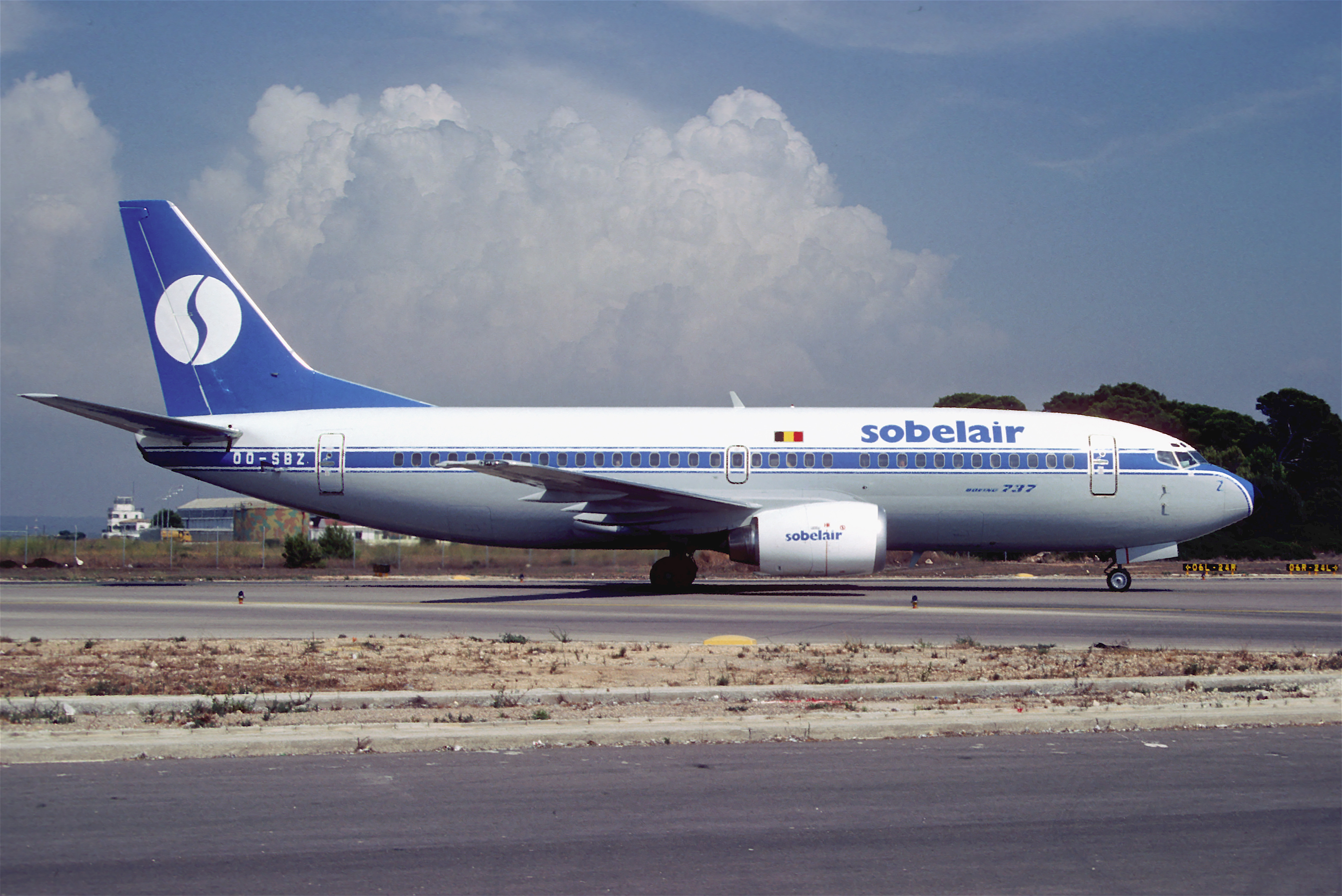 Sobelair Boeing 737-329; OO-SBZ, September 1987